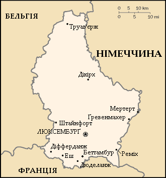 Мапа Люксембугру